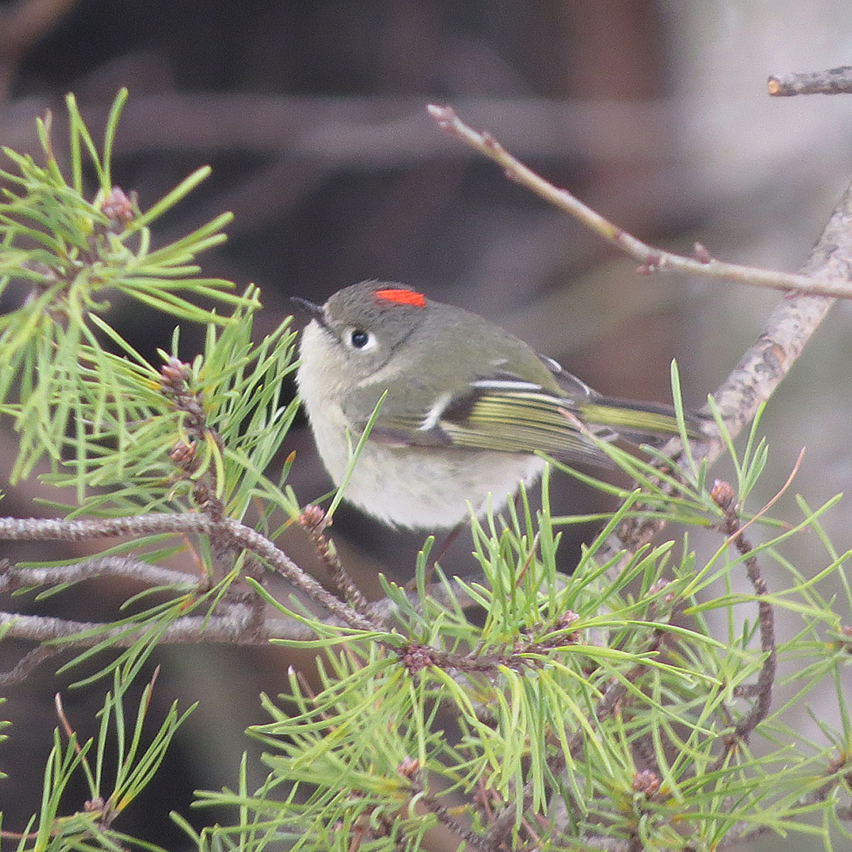 Regulus calendula calendula 26 feb 15 Conestee, SC